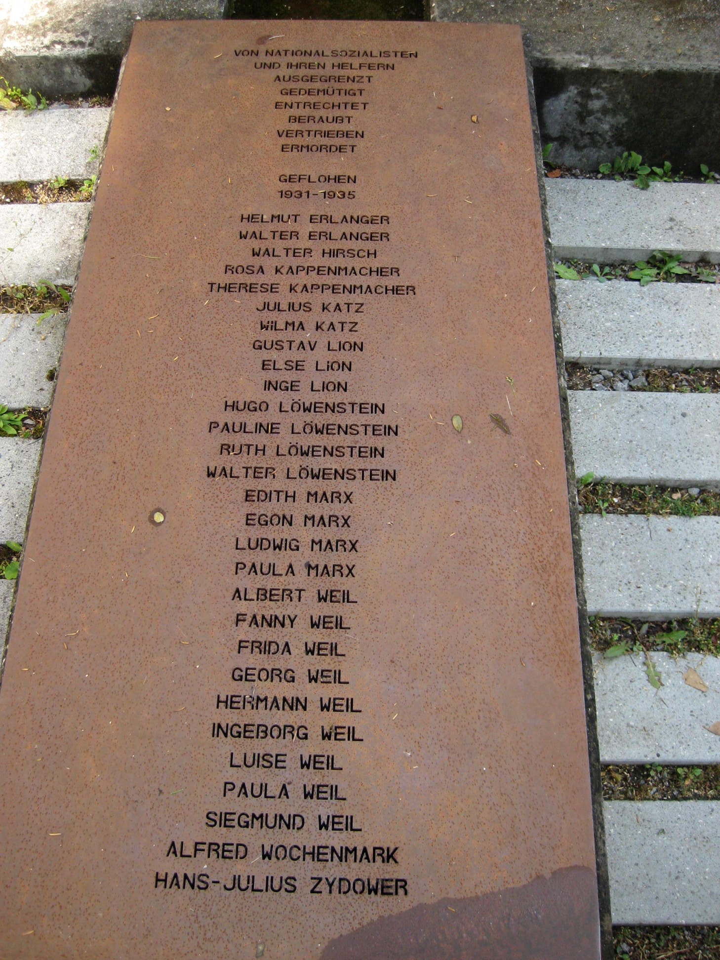 Gert Riel: Mahnmal am Synagogenplatz (2000), Tübingen, Gartenstraße 33 - Teilstück: eine der drei Platten mit den Namen der vertriebenen und ermordeten Juden